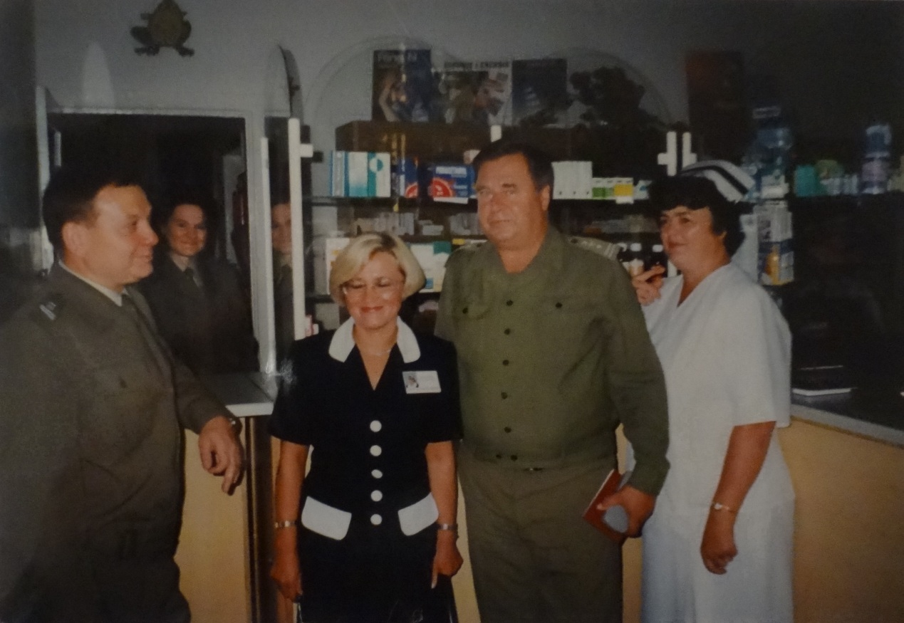 Wizyta Zastępcy Szefa Służby Zdrowia POW ppłk lek. Kazimierza Rapickiego w batalionie medycznym